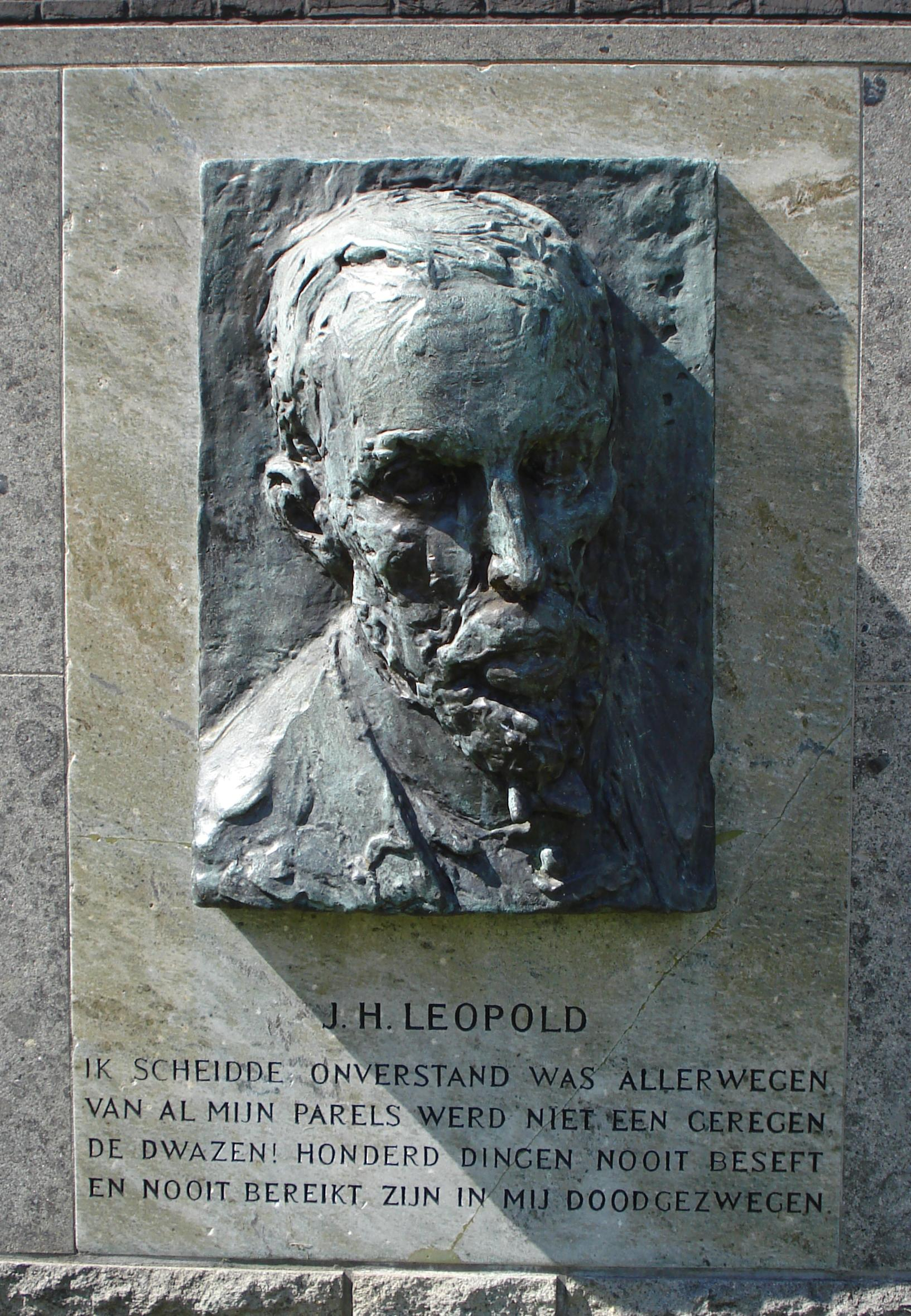 Rotterdam, Wytemaweg. Kunstwerk "Leopold" van Charlotte van Pallandt. Rotterdam/The Netherlands.